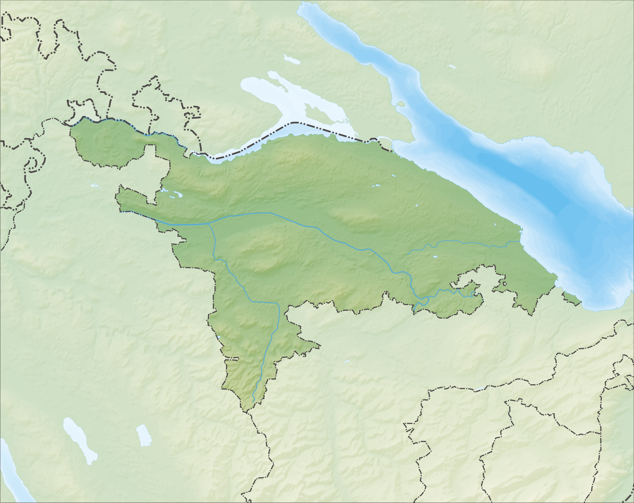 Reliefkarte des Kantons Thurgau Topographischer Hintergrund: NASA Shuttle Radar Topography Mission (public domain). SRTM3 v.2.